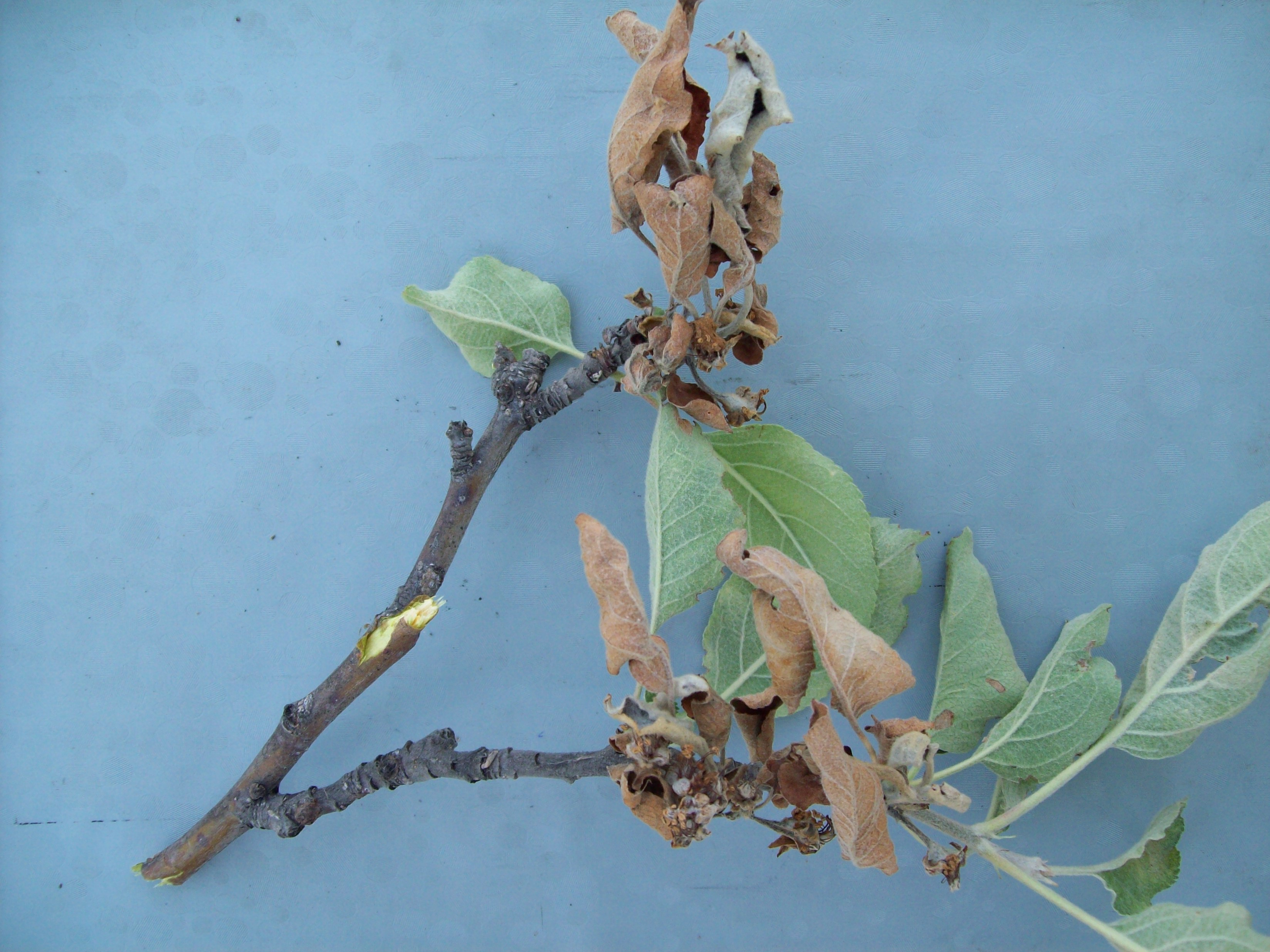 монилиальный ожог яблони. Болезнь яблони.